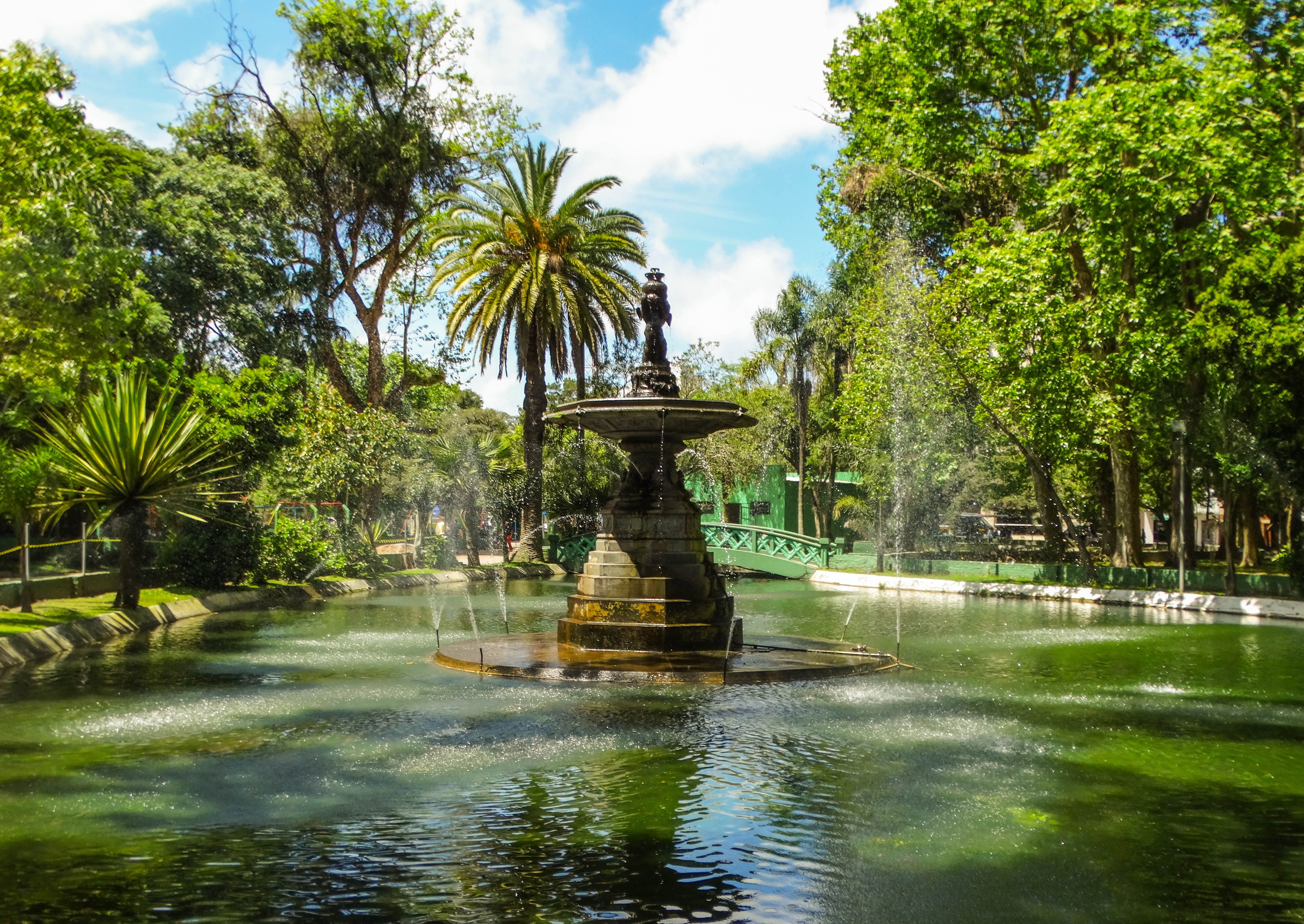 Praça Tamandaré, Chafariz dos Anjos